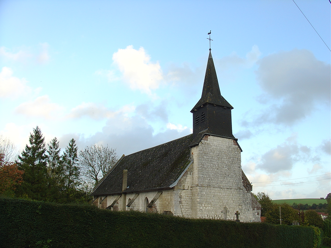 Église de Wambercourt